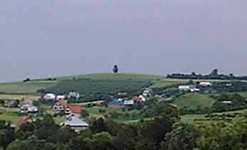 Einzelbaum als Landmarke Foto: Acf 2004, Public Domain